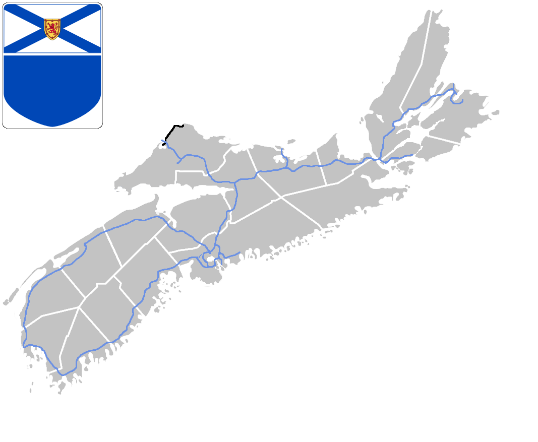 نقشه شاهراههای استان نوا اسکوشیا در کانادا